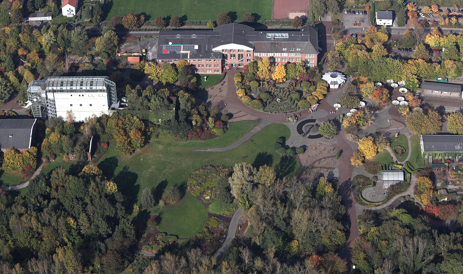 Luftbildaufnahme Hamm